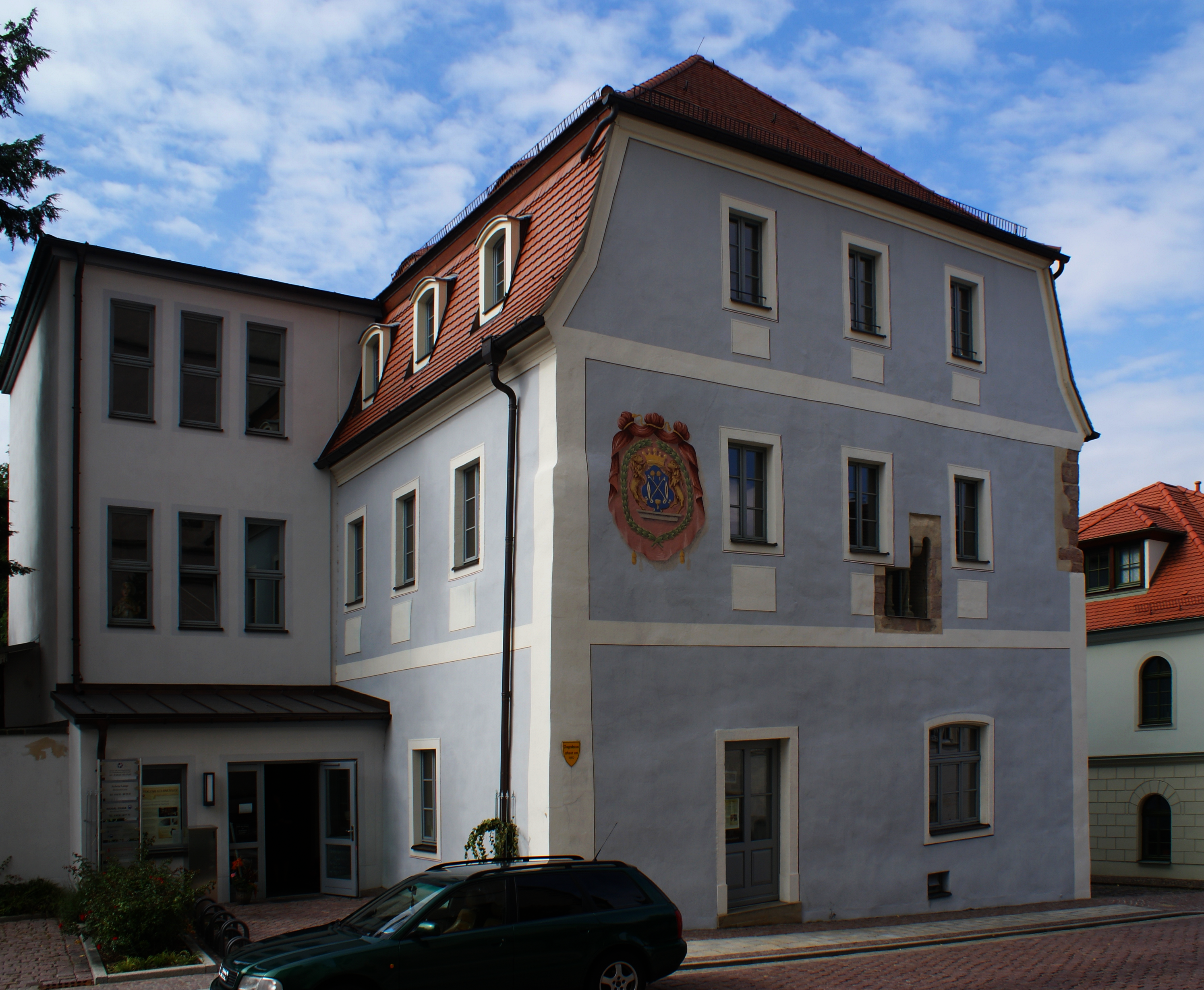 Das Vogtshaus in Oschatz (Sachsen), Ansicht von Südost.